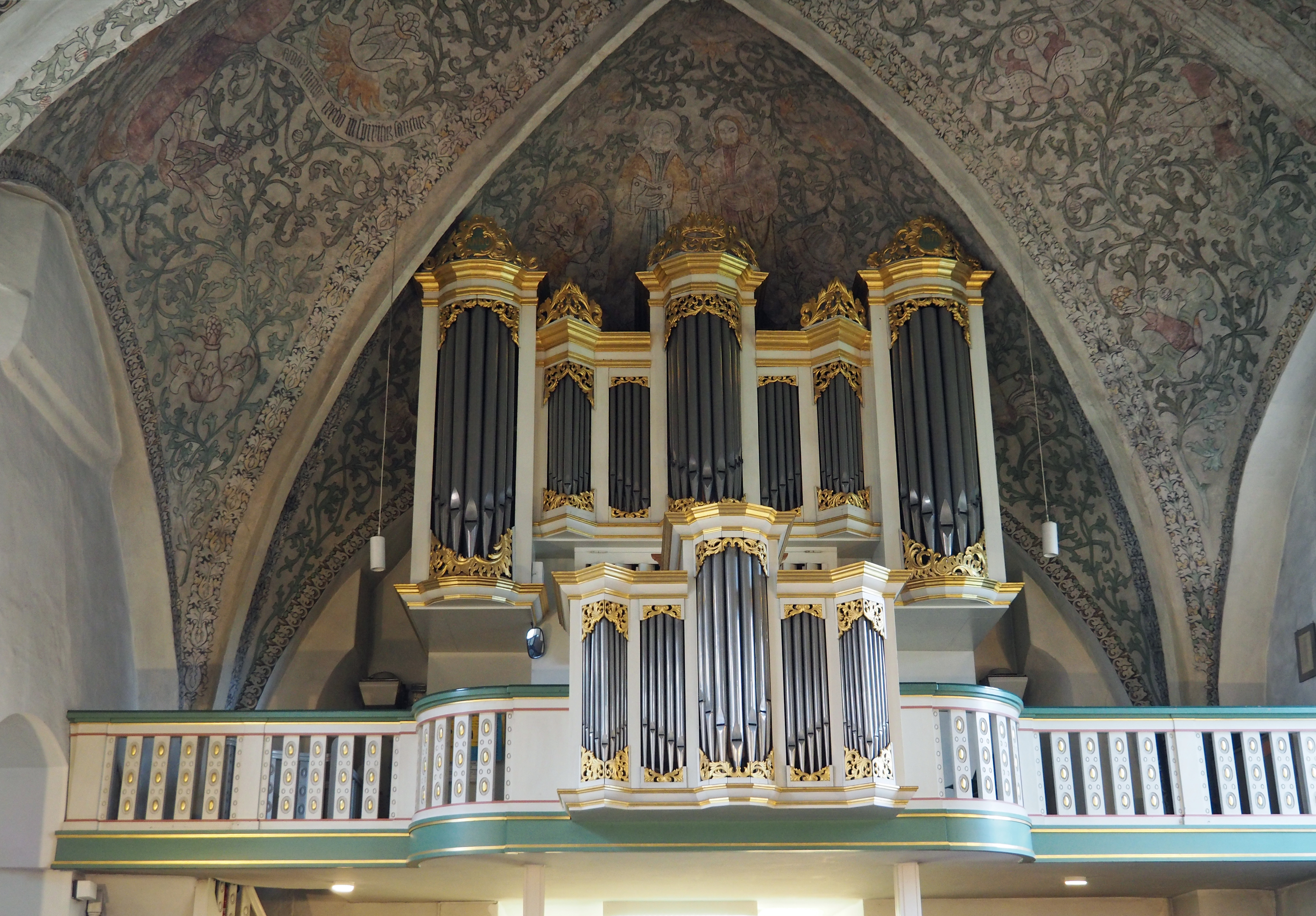 Orgel in der Johanniskirche von Flensburg